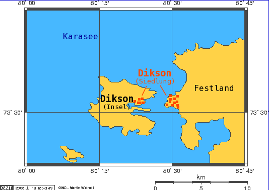 map of Dikson, Sibiria, Russia